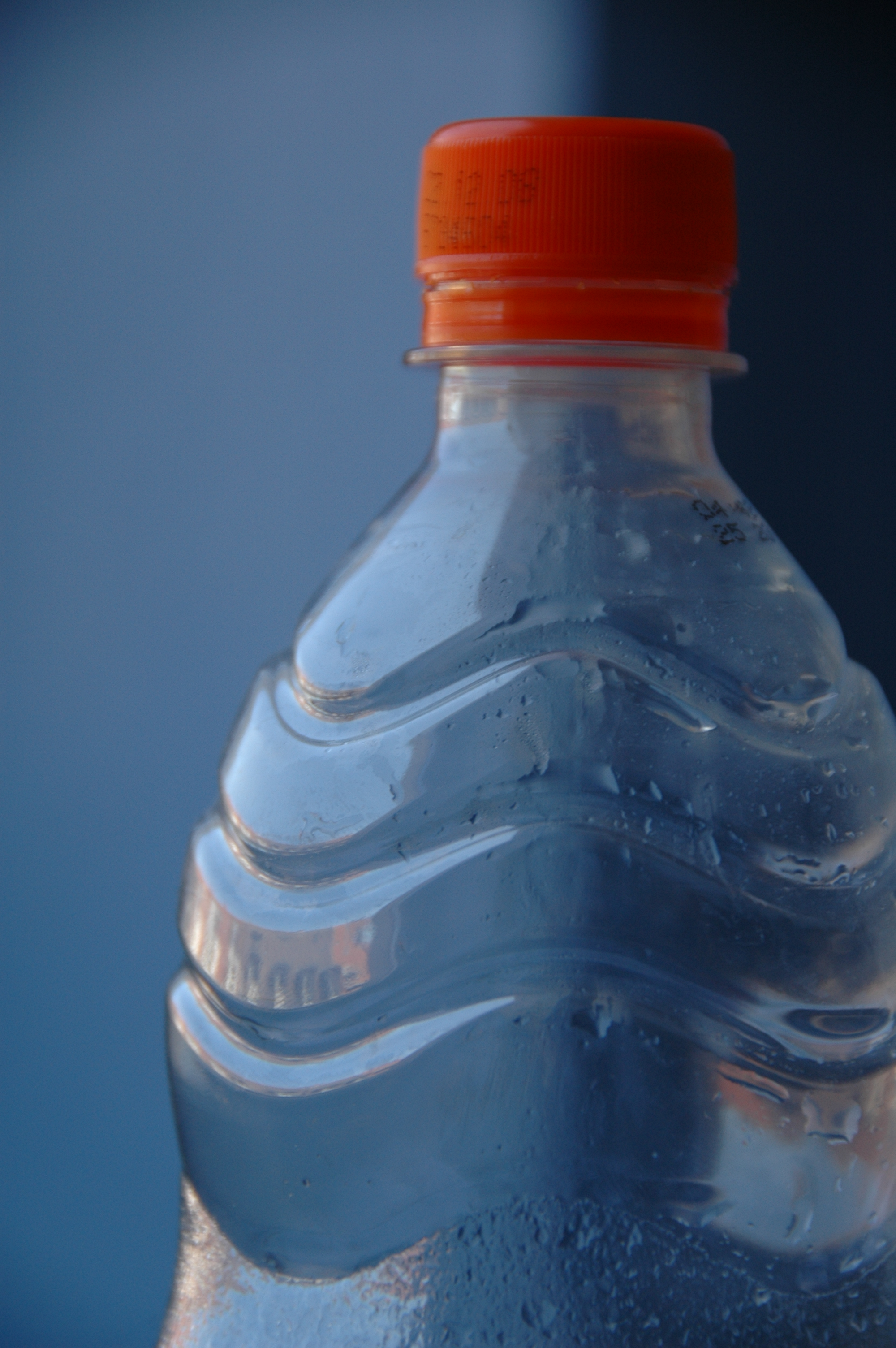 Pet Flasche, Deckel orange, blauer Hintergrund